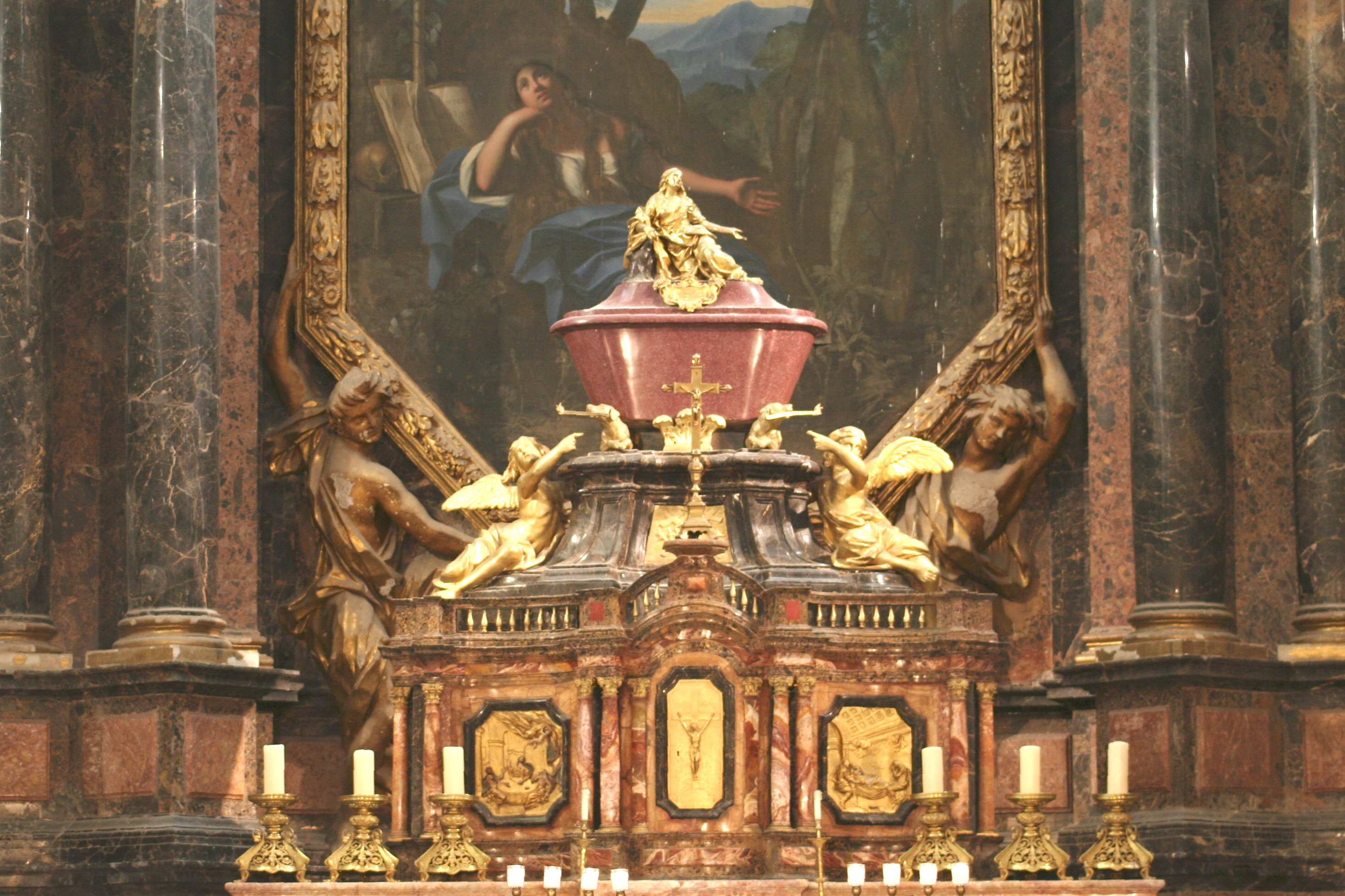 Maître-autel de la basilique Sainte Marie-Madeleine à Saint-Maximin dans le département du Var.